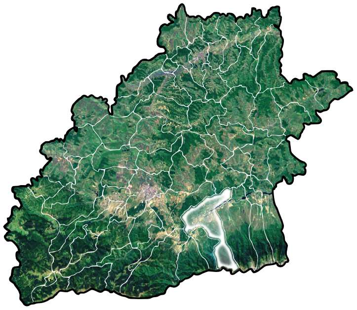 Avrig jud Sibiu.